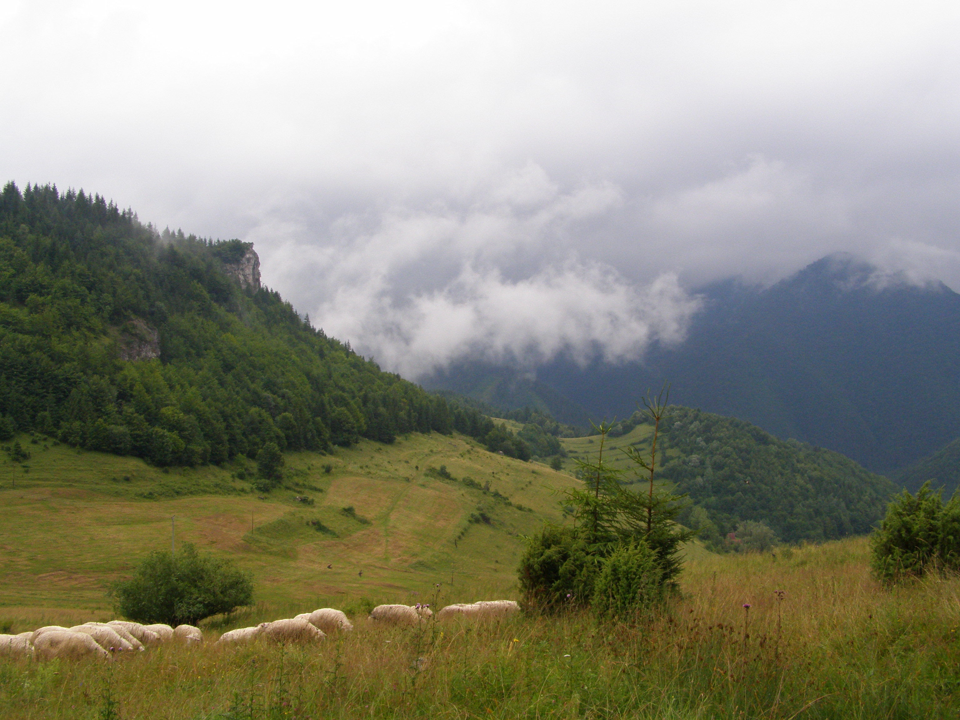 Krivánská Malá Fatra, sedlo Príslop nad Bielou, pohled na východ, vlevo skály na úbočí vrcholu Čapica (875 m))